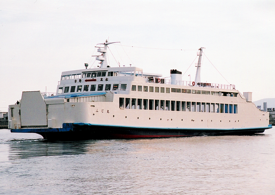 宇高国道フェリー 高松－宇野航路フェリー 加藤汽船 ふじ丸